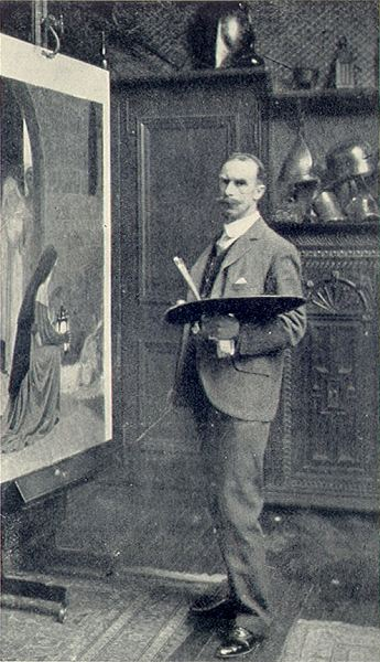 Фотопортрет Эдмунда Лейтона